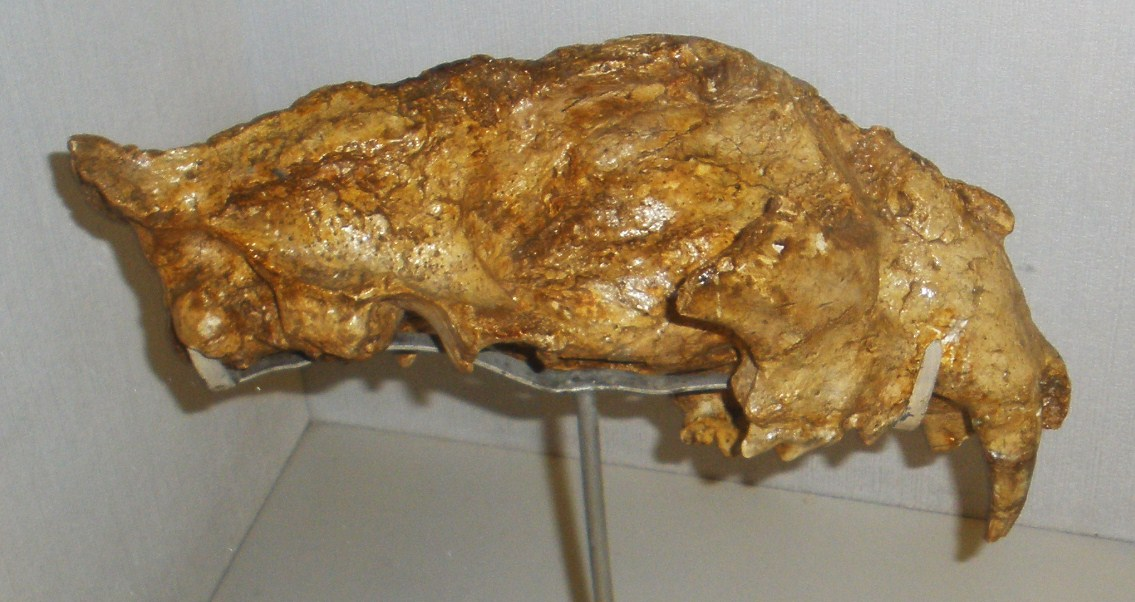 Fossil of Panthera, an extinct mammal- Took the picture at Museo di Paleontologia di Firenze